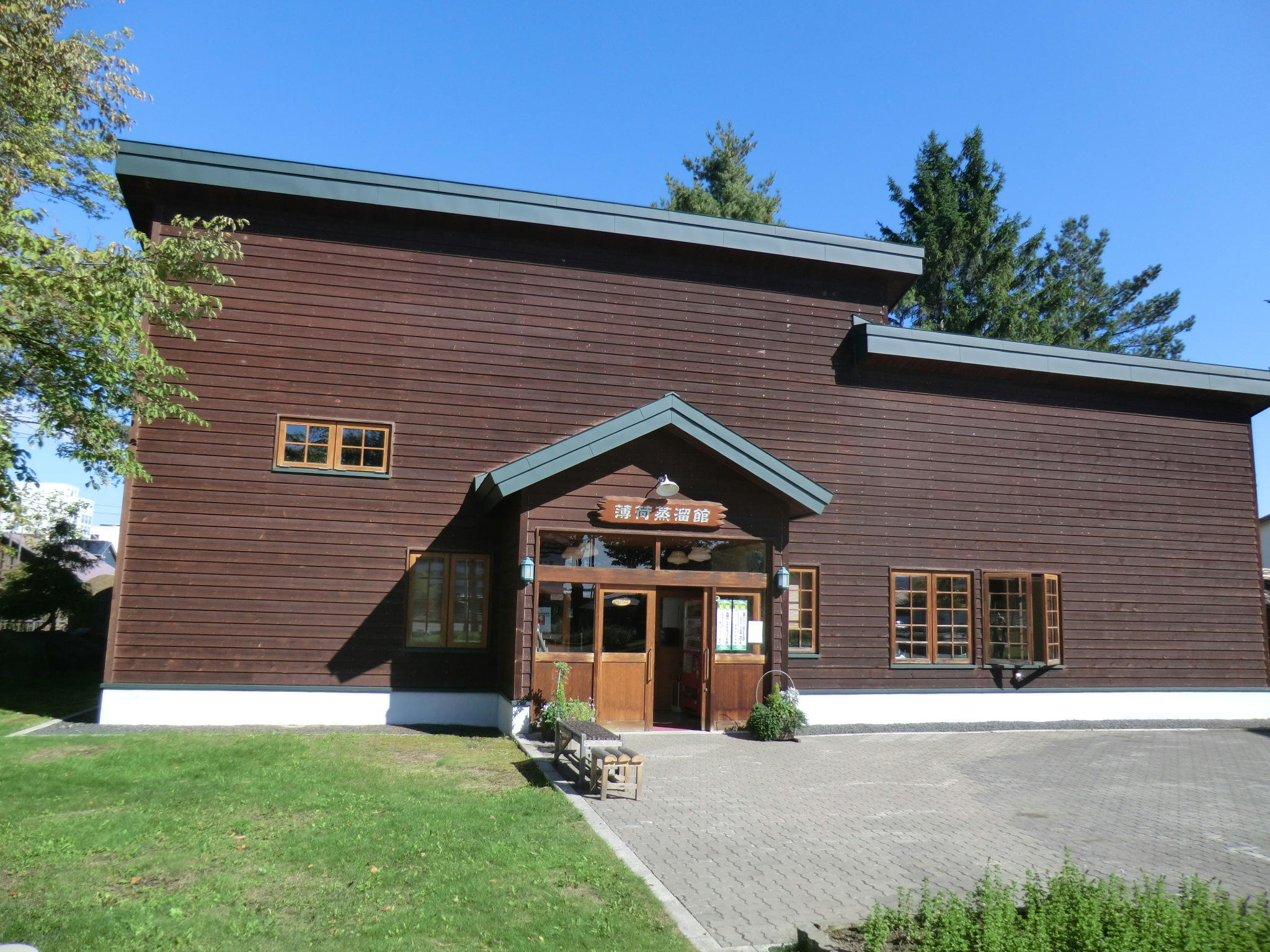 北海道北見市にある薄荷蒸留館。北見ハッカ記念館に隣接しています。